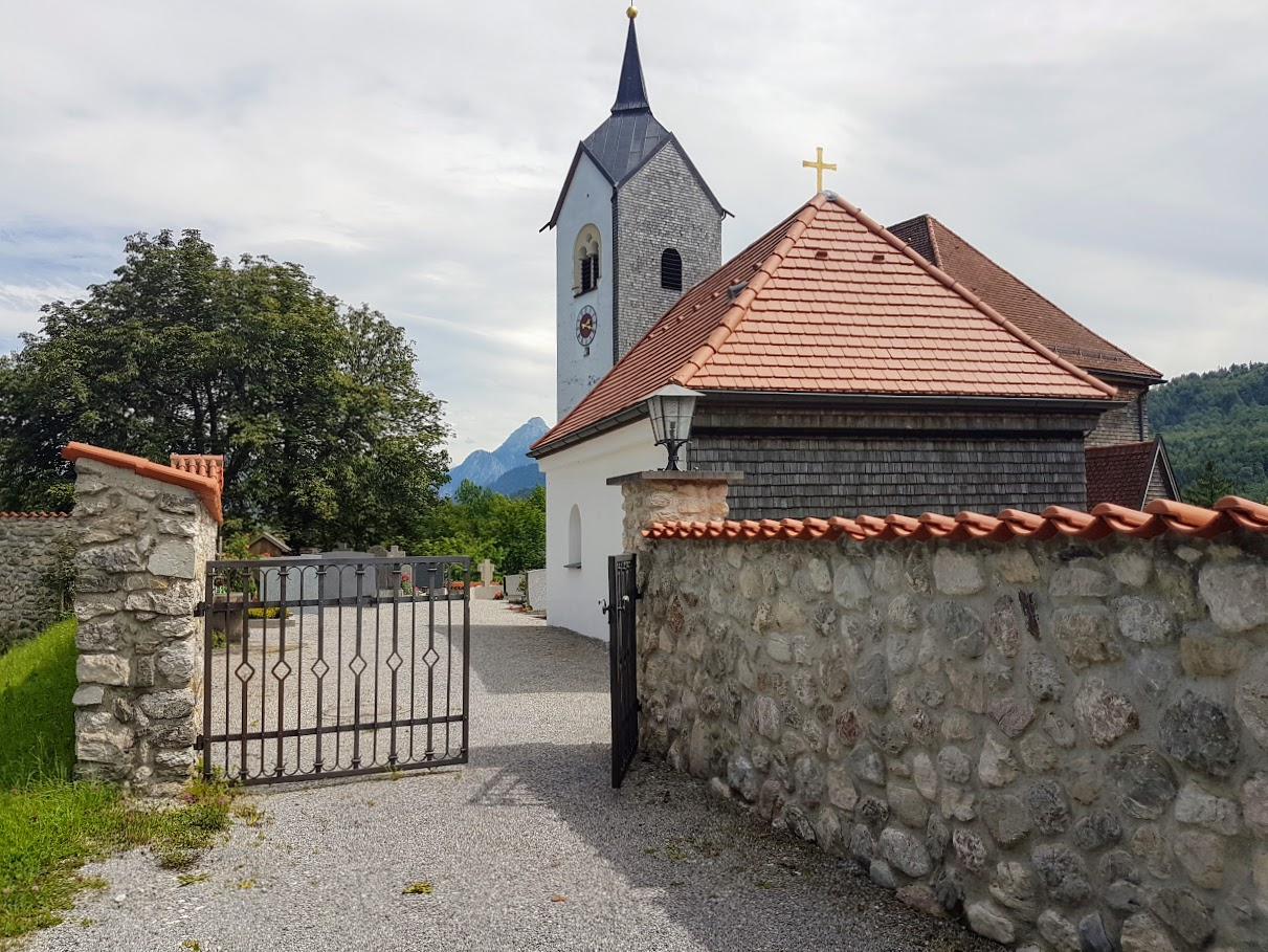 Kirche "St. Walburga, Philippus und Jakobus" (2017)